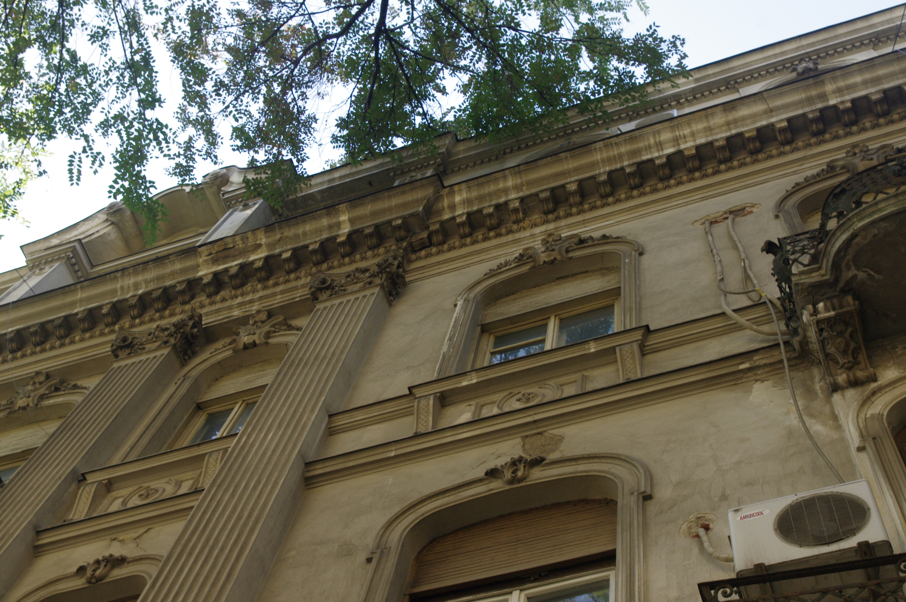 Imobil (PMB)